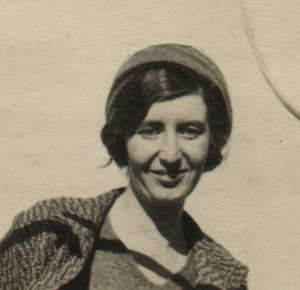 אולגה טפנל